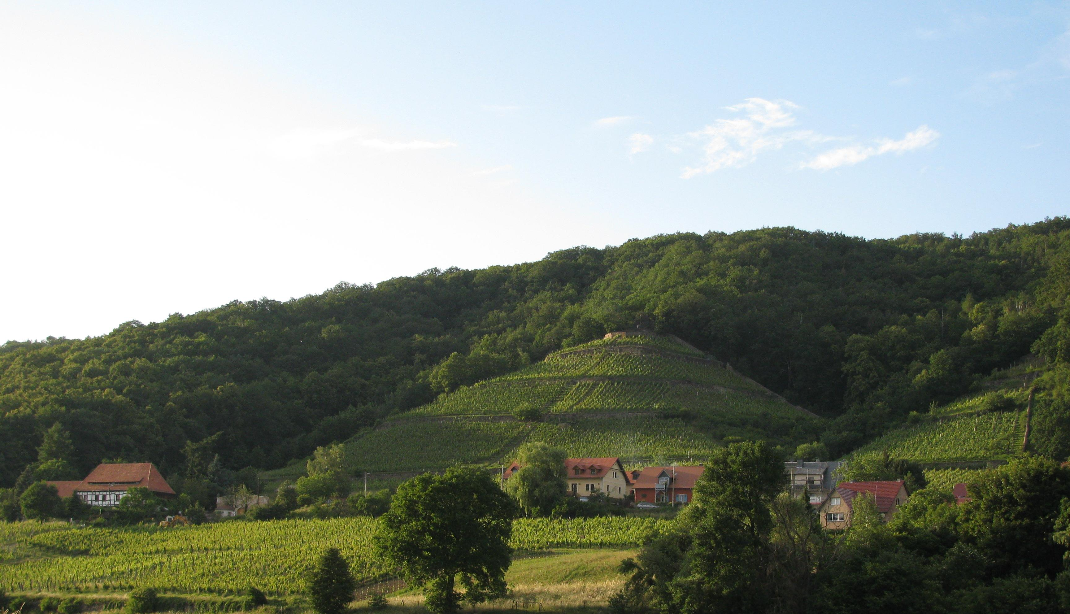 Weinberg Rysselkuppe in Oberpoyritz, Dresden